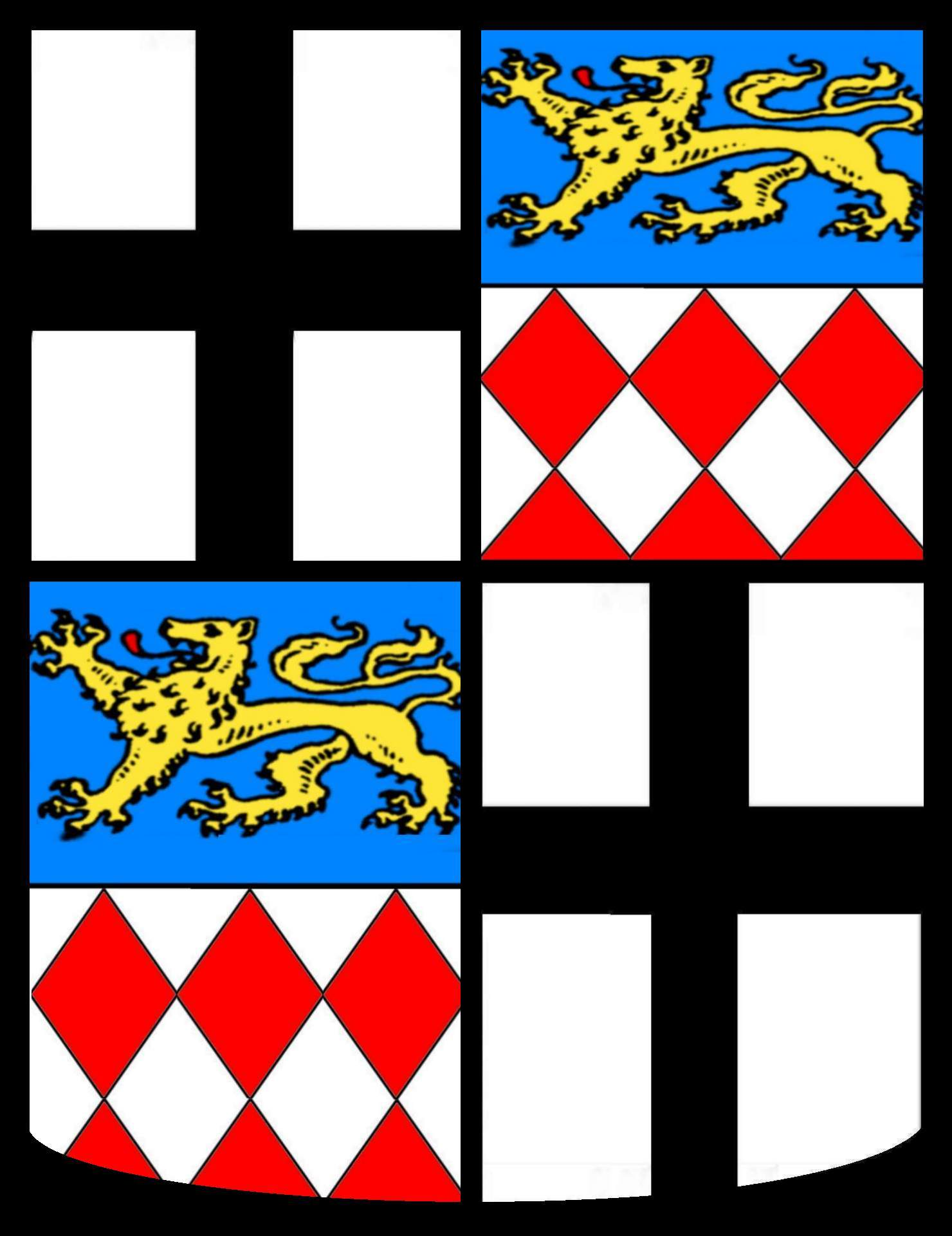 Wappen der Schenken von Schweinsberg, Fürstäbte von Fulda, Philipp Schenk zu Schweinsberg 1541–1550 Philipp Georg Schenk zu Schweinsberg 1567–1568 Johann Bernhard Schenk zu Schweinsberg 1623–1632